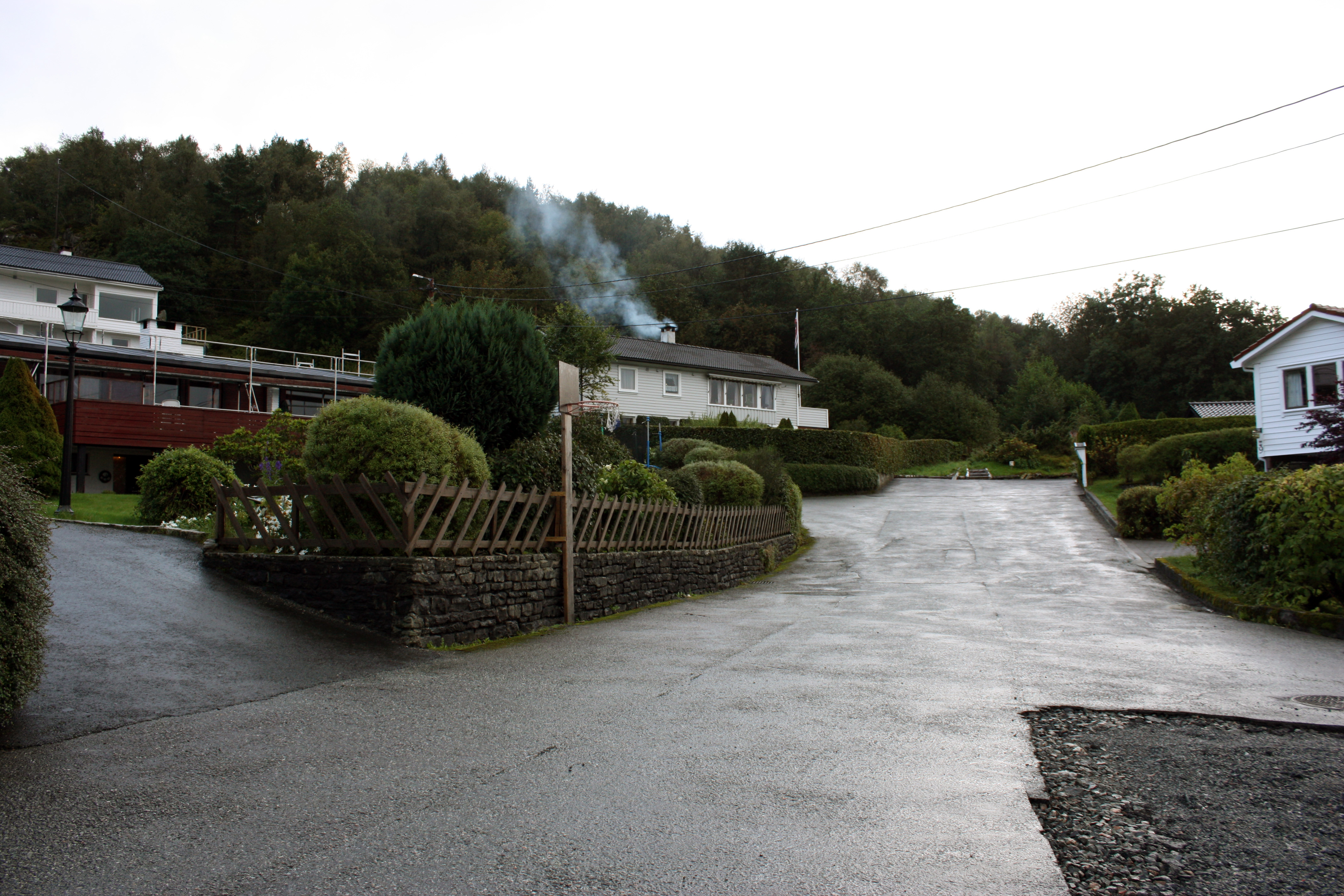 Steintrælia, Fana, Bergen.